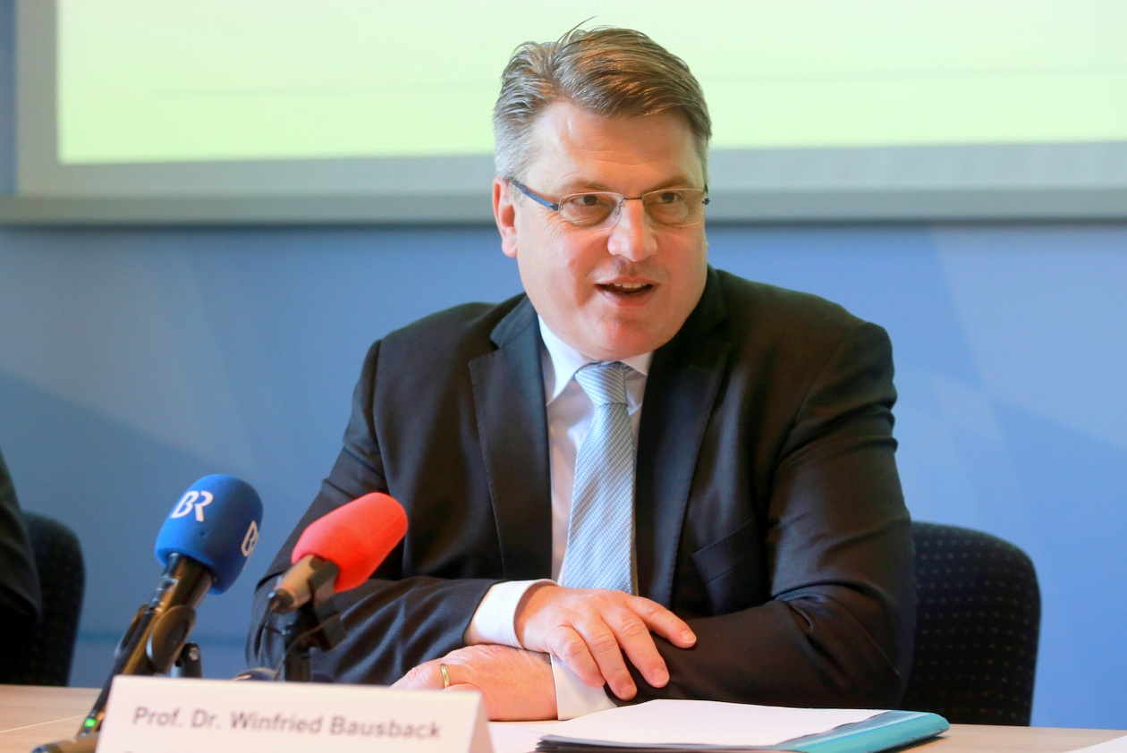 Winfried Bausback, deutscher Politiker (CSU), Jurist, Hochschullehrer und u.a. seit Oktober 2013 bayerischer Staatsminister der Justiz (im Kabinett Seehofer II). Hier während einer Pressekonfernz im Bayerischen Justizministerium (Vorstellung der Strafverfolgungsstatistik 2016) Titel des Werks: "Winfried Bausback, bayerischer Justizminister (2017)"